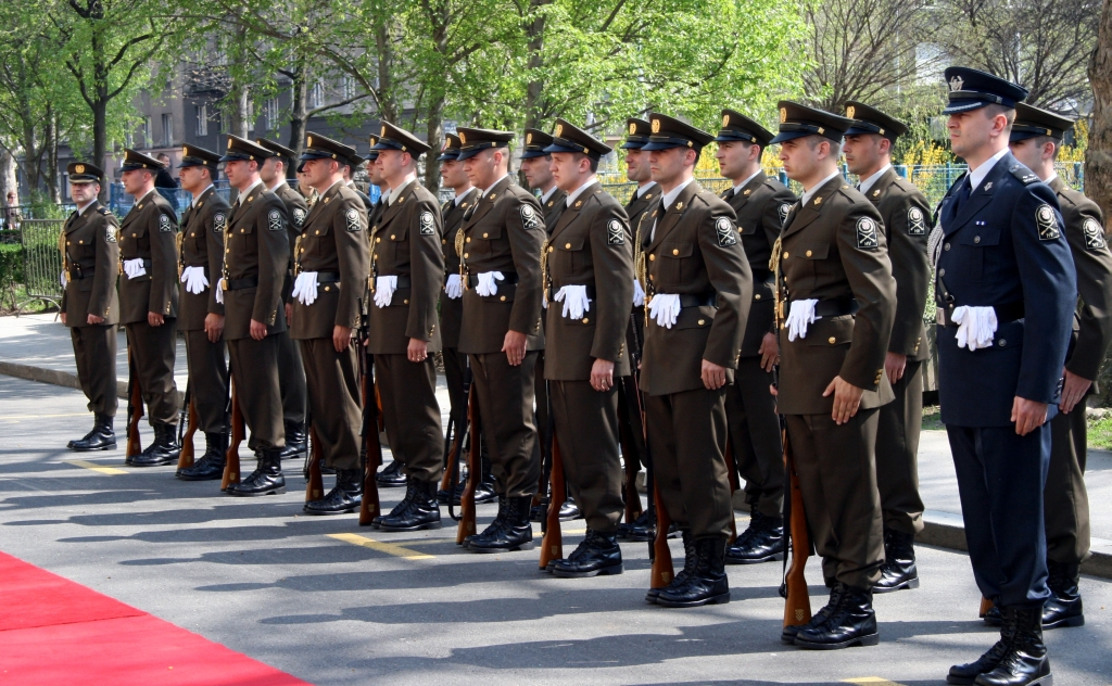 Svečanost podizanja NATO-ve zastave ispred zgrade MORH-a u Zagrebu.